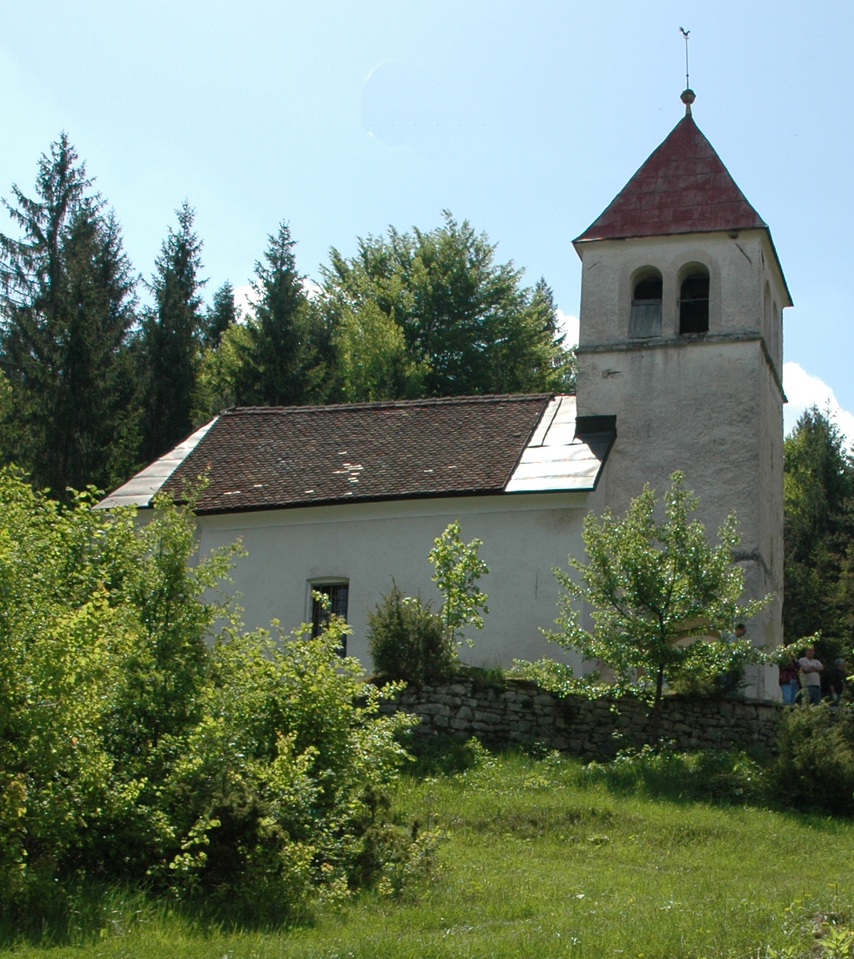 Foto: Alenka Veber, cerkev sv. Tomaža na Vrhu